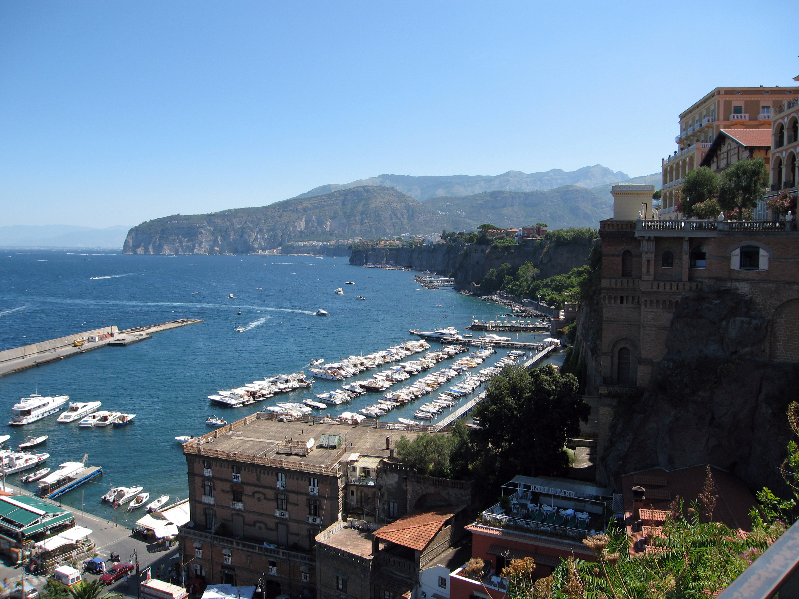 Piano di Sorrento